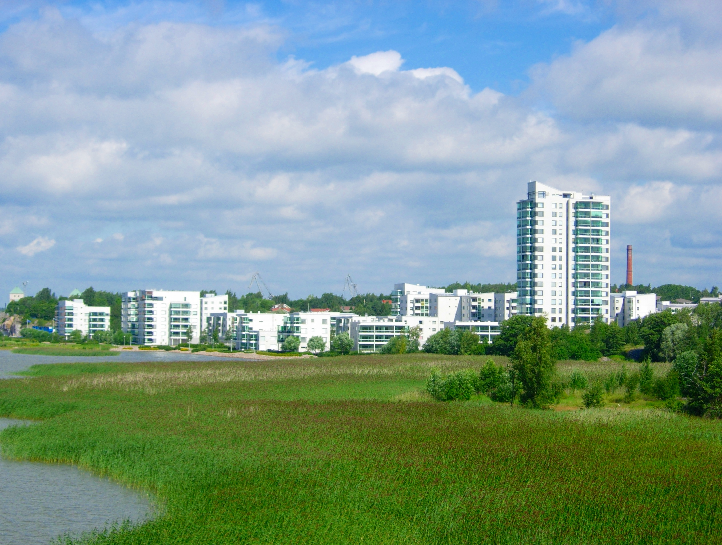 Majakkaranta, Pihlajaniemi. Arkkitehti Frank Schauman, 1990–2005.